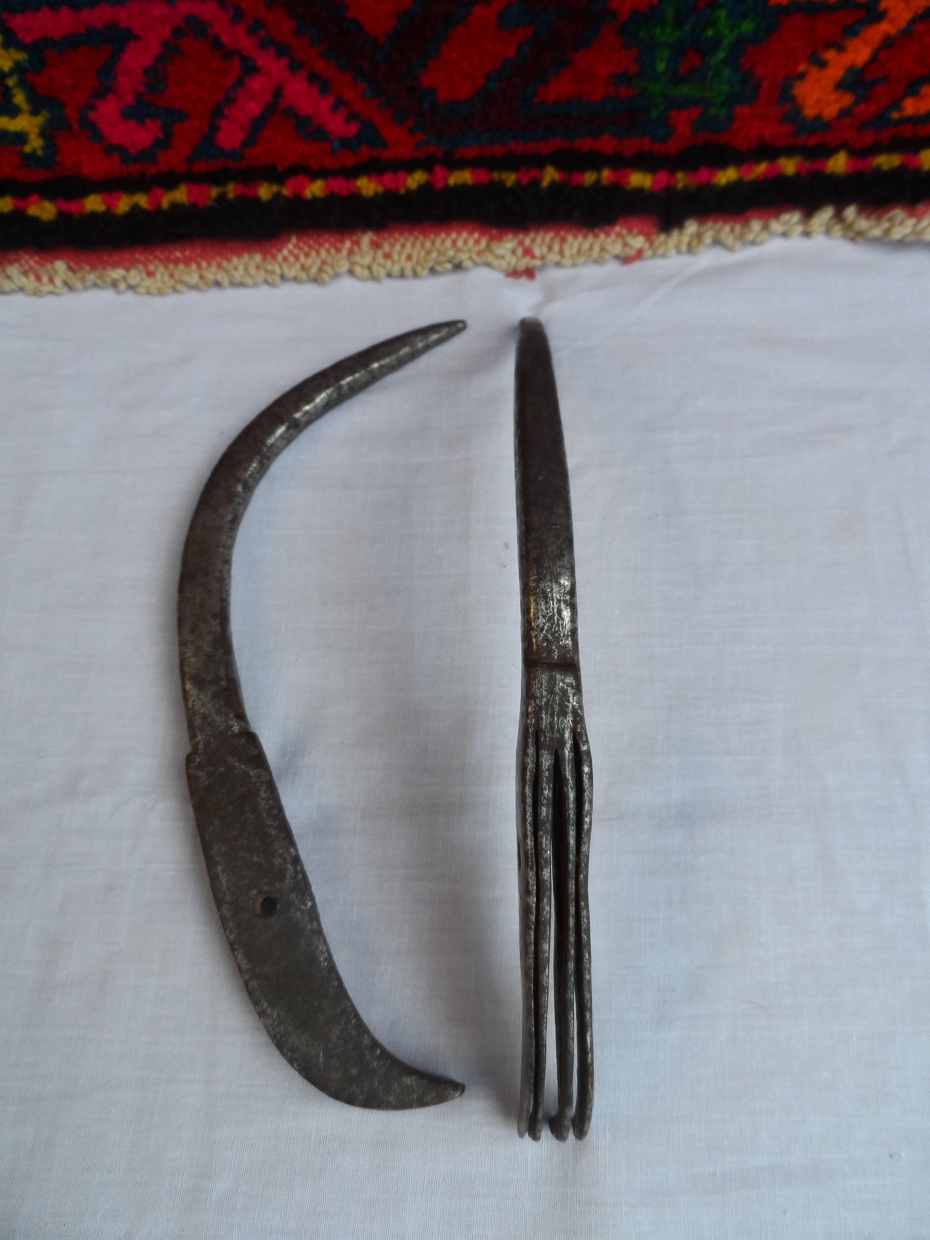 Kirkid (Kirkit, və ya kirki) — xalça, palaz və digər xalça məmulatlarını toxuyarkən ikinci arğacı salmaq və bərkitmək üçün istifadə edilən, qədimdə bəzi heyvanların (əsasən də keçi və ya ceyran) buynuzundan, metaldan və s.-dən hazırlanan, ikidən dördə qədər dişi olan alətdir.